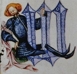 Václav IV. v bibli Václava IV.